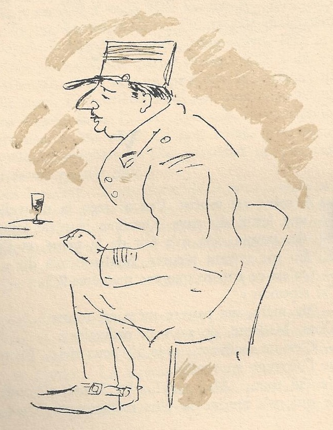 Illustration de Jean Launois (1898-1942), pour "Le Journal d’une femme de chambre", roman d’Octave Mirbeau (1848-1917). Éditions Nationales, 1935.